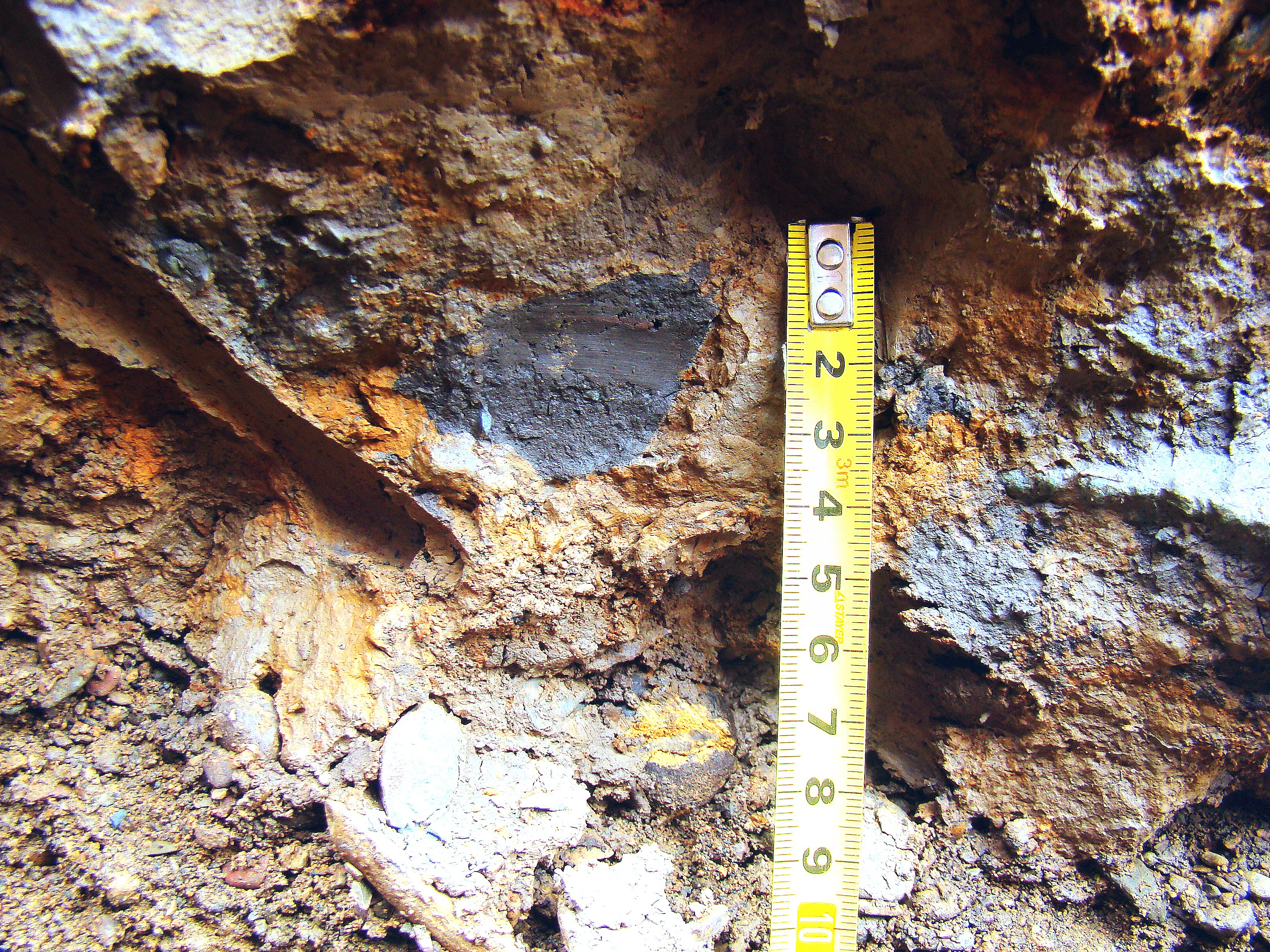 Совершенно несортированная смесь тела свежего водонасыщенного оползня. Хорошо виден глинистый окатыш угольного цвета. Август 2009. Горный Алтай.